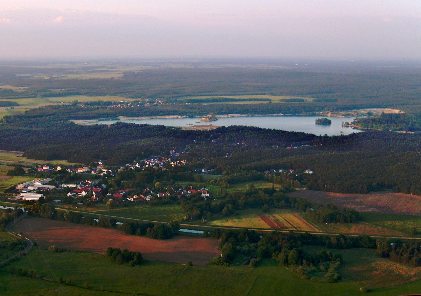 Der Ort Zeischa aus der Luft.